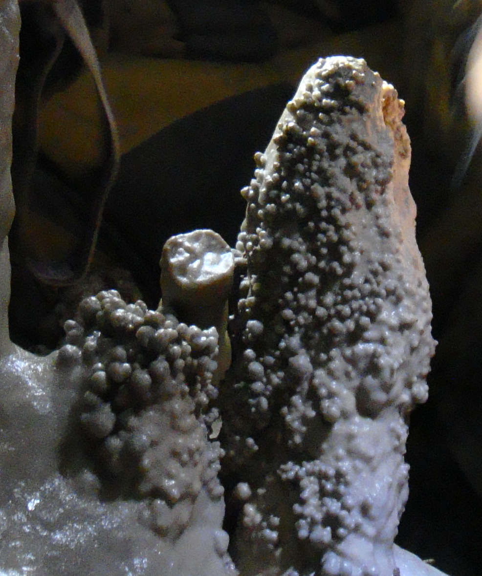 Cueva en las cercanías de Llanes, Asturias (España). Espeleotema.